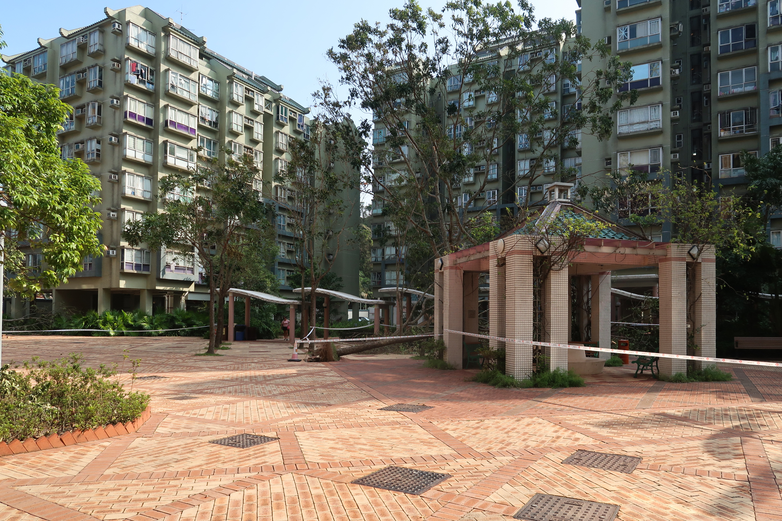 Lakeside Garden Garden plaza